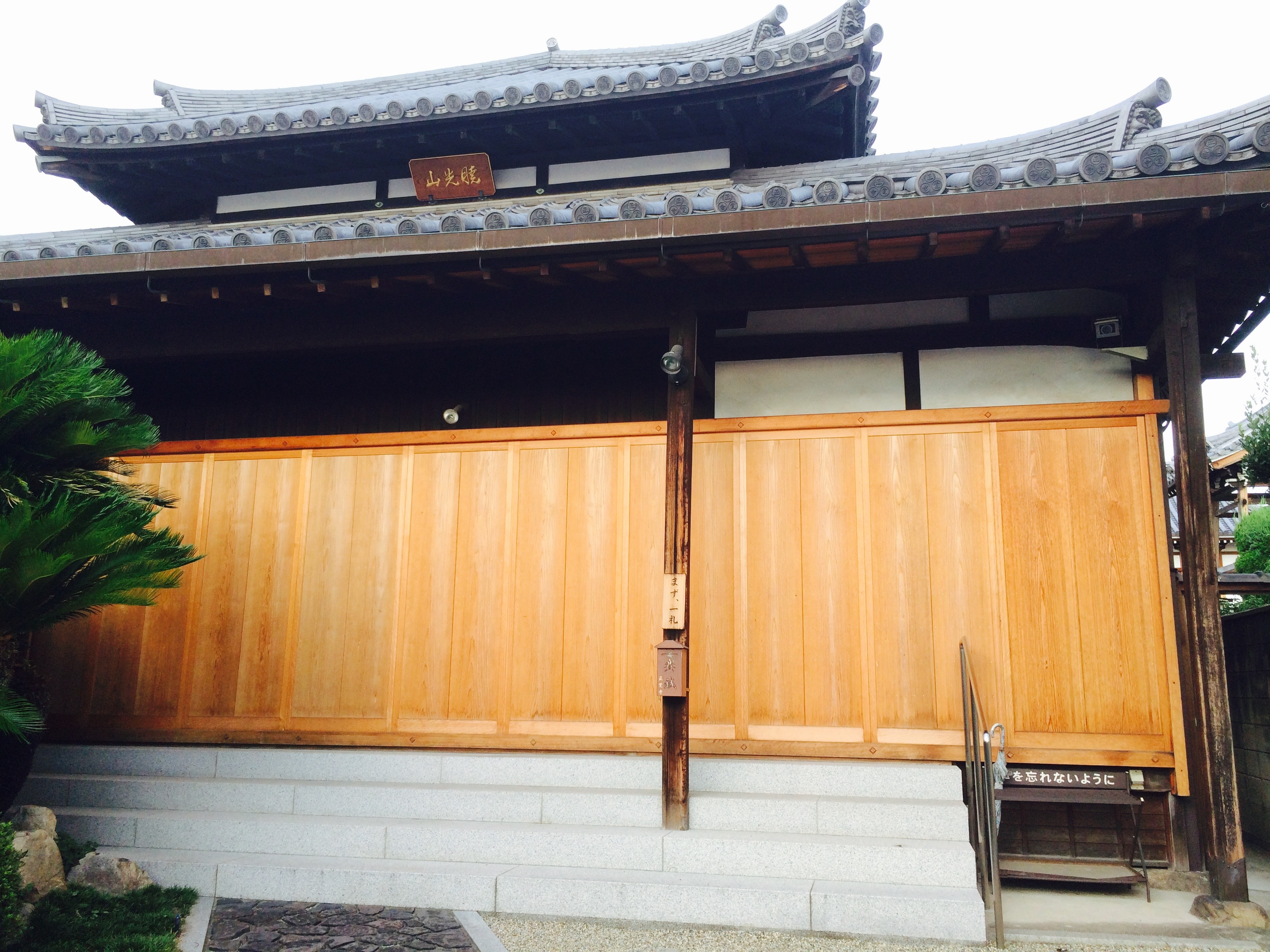 奈良市正覚寺（南中町）境内